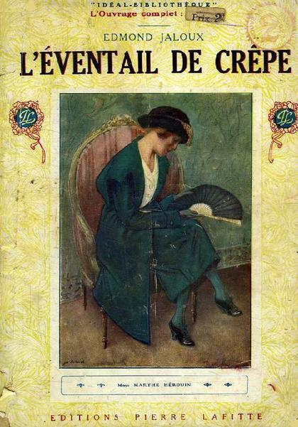 Couverture de L’Éventail de crêpe, roman d'Edmond Jaloux, collection Idéal-Bibliothèque, Paris, Pierre Lafitte, 1911 - illustrations de Jacques d'Otémar.